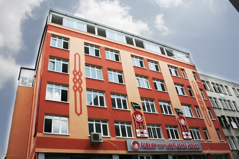 Furkan Vakfı'nın Adana'daki Genel Merkez Binası